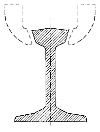 Zahnstangenbremse Strub: Profil